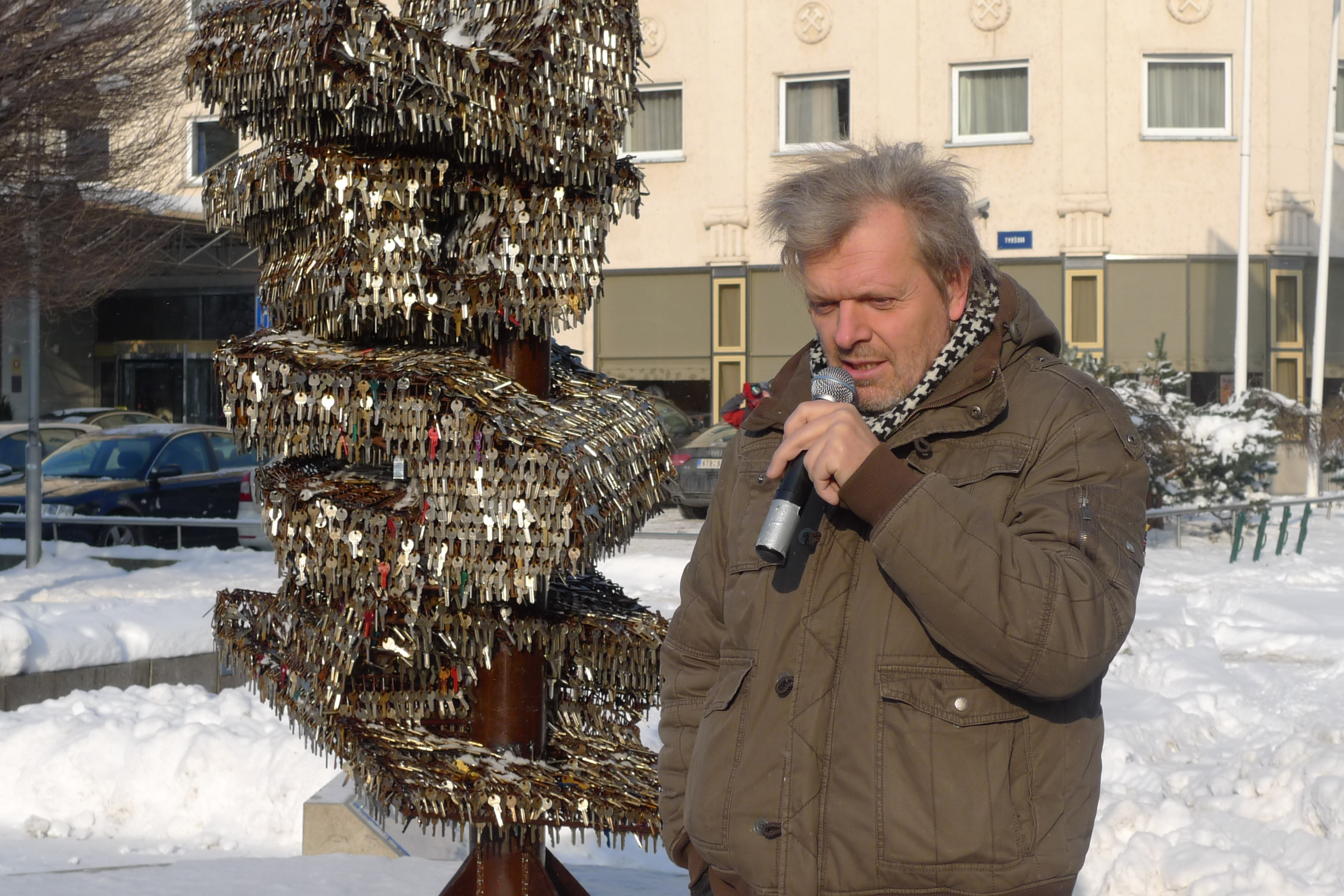 Jiří David, odhalení Klíčové sochy v Ostravě.